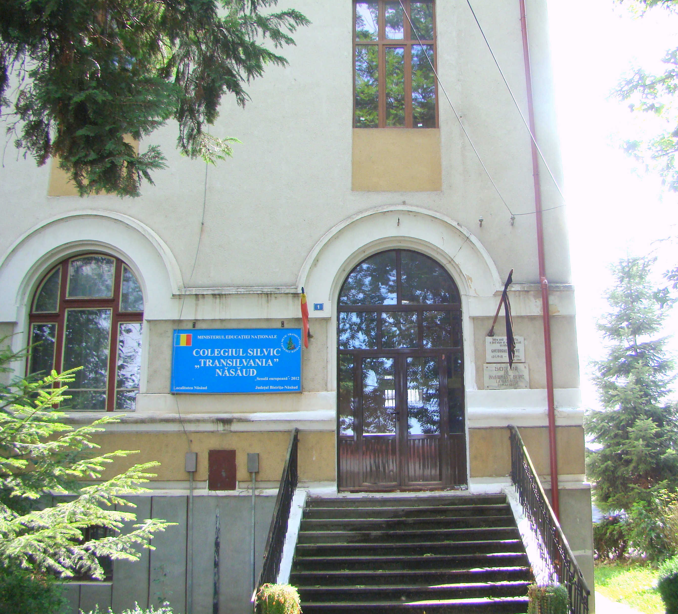 Școala Normală, azi Grupul școlar Silvic, oraș Năsăud, Str. Gării 1